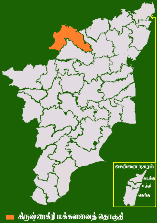 தமிழக வரைபடத்தில் உள்ள கிருஷ்ணகிரி மக்களவைத் தொகுதி